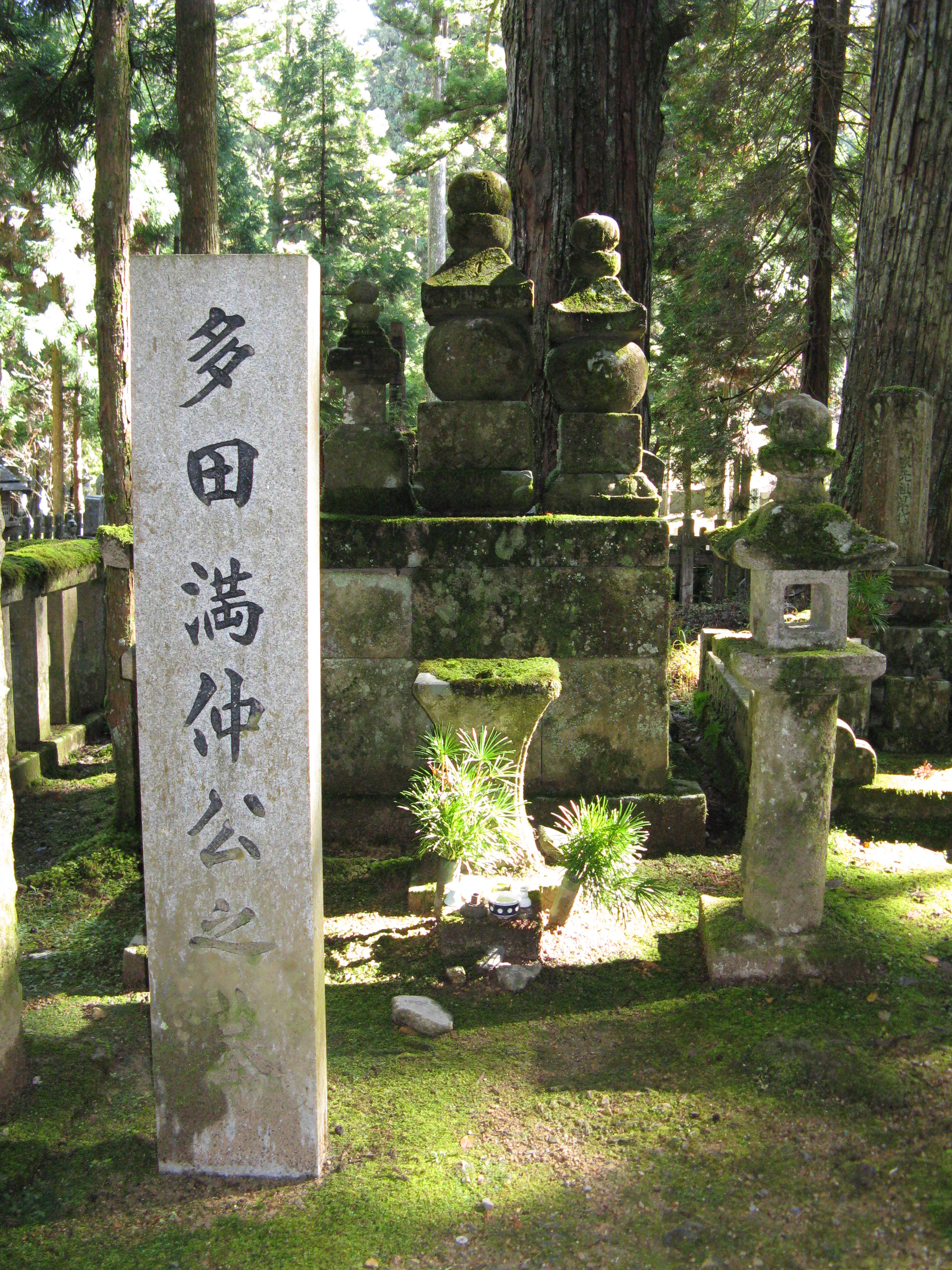 多田満仲墓